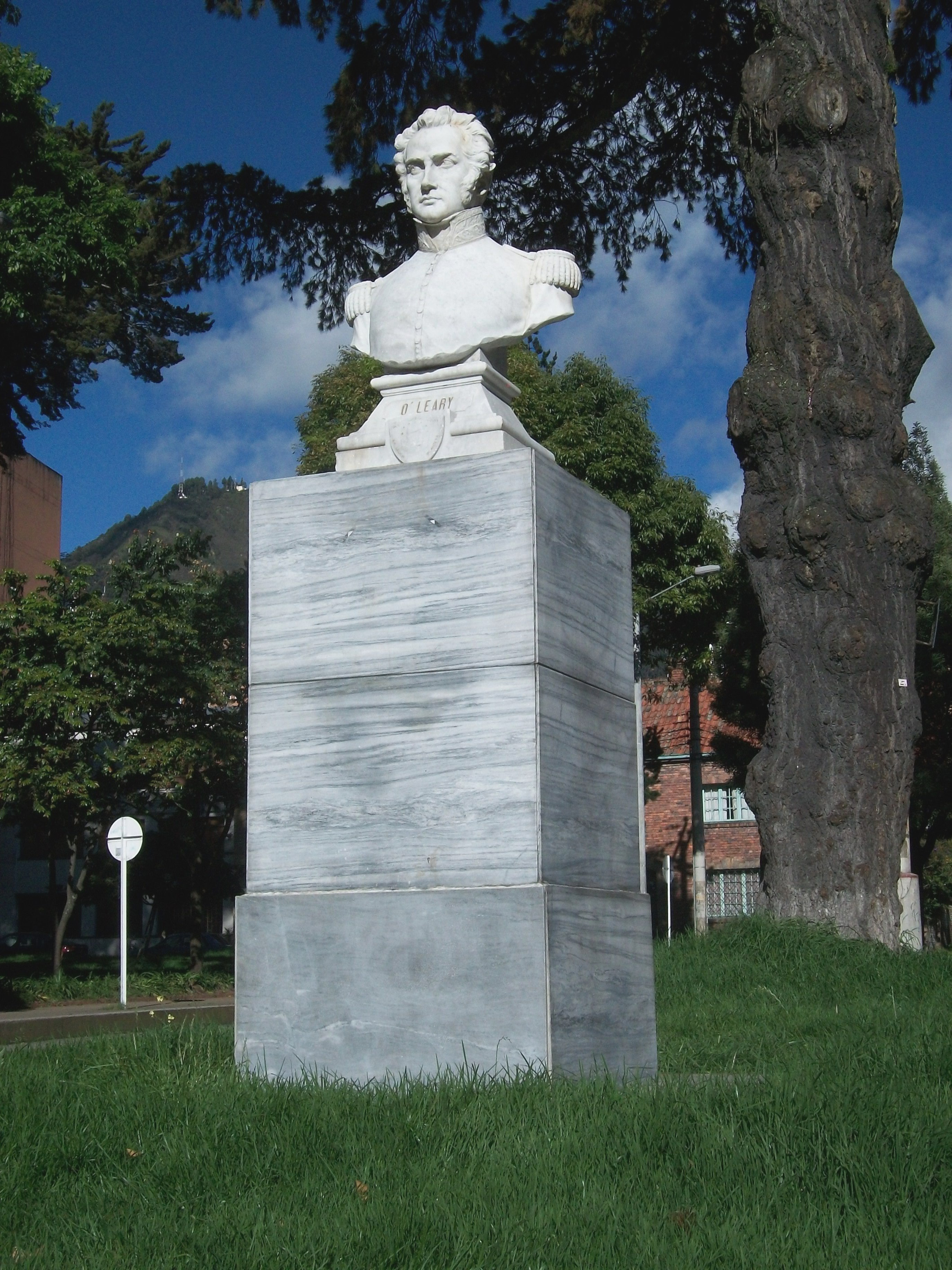 Calle 46 con carrera 17. Bogotá. Teusaquillo.